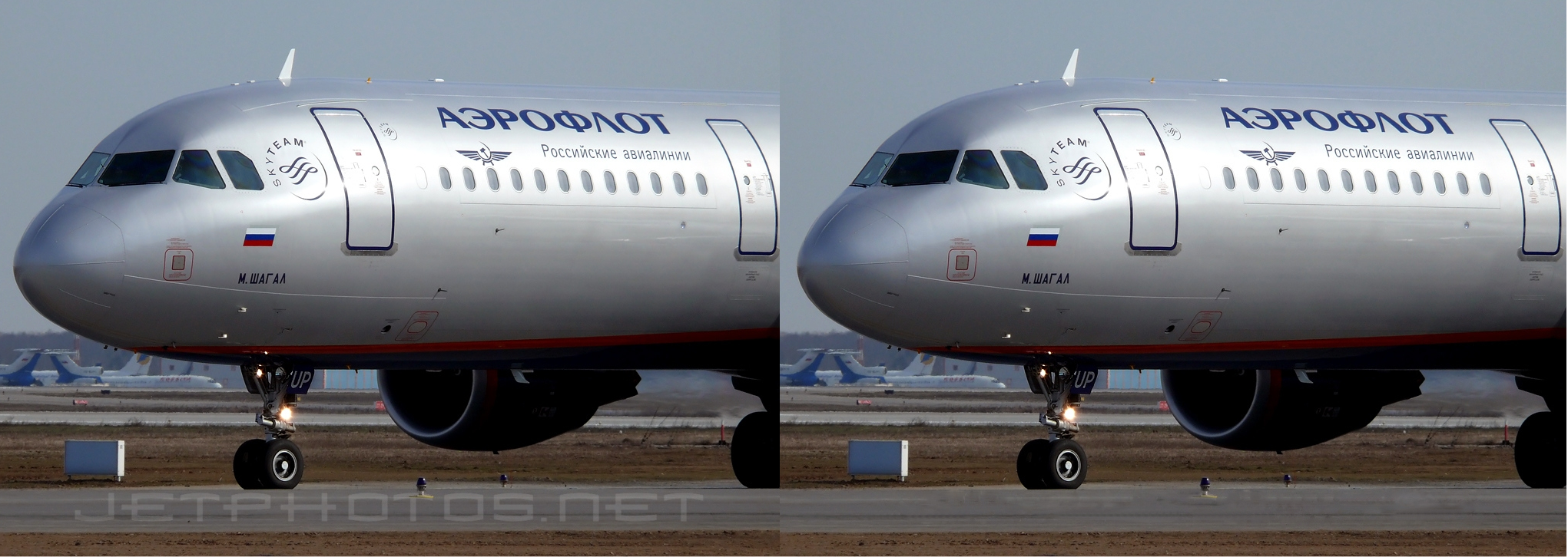 Exemple d'inpainting, retrait d'une watermark